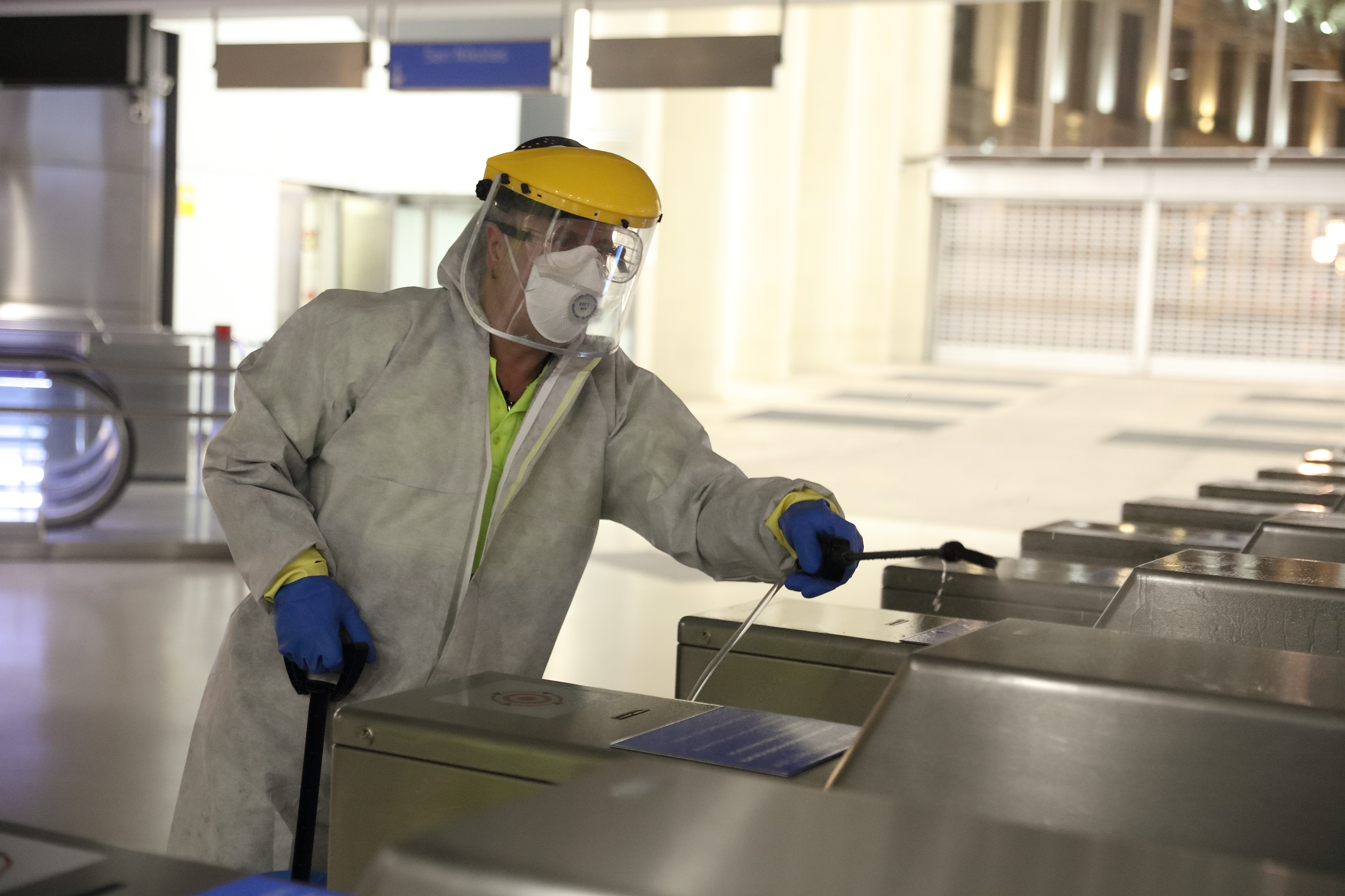 Euskadik desinfekzio-lanak indartu ditu bere trenbide-sareko geltokietan